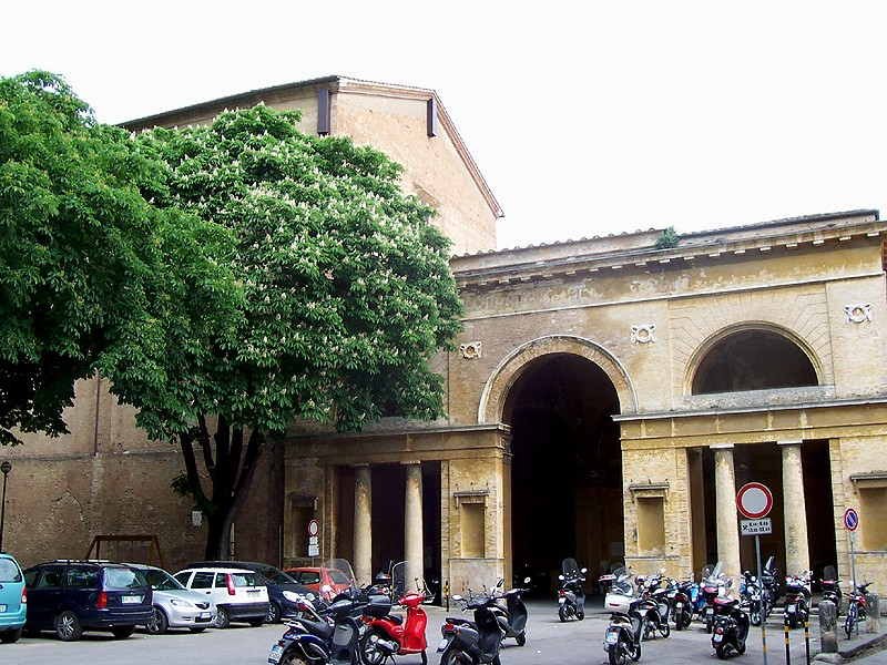 Siena - Chiesa di S. Agostino and Collegio Tolomei (right side)